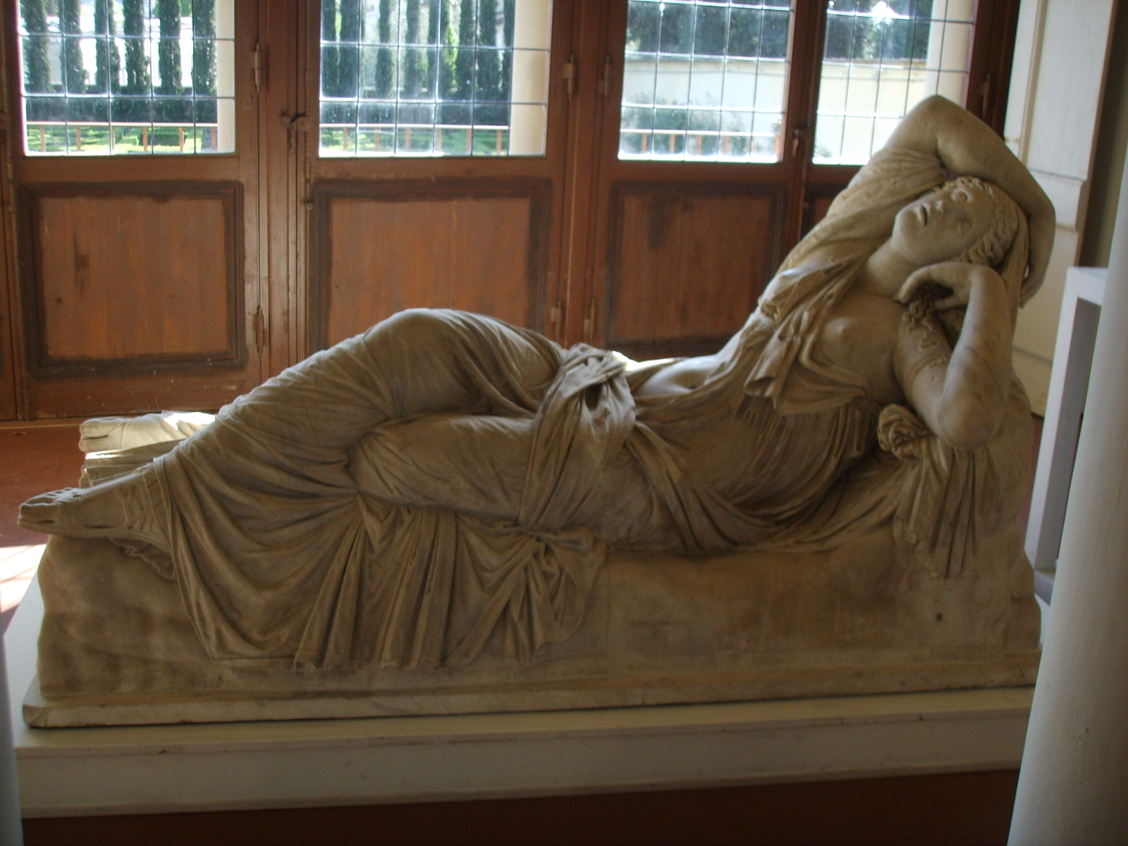 Villa Corsini (Firenze). Arianna dormiente, copia romana da originale greco degli inizi del II sec aC. Questa statua è stata poi trasferita alla galleria degli Uffizi.